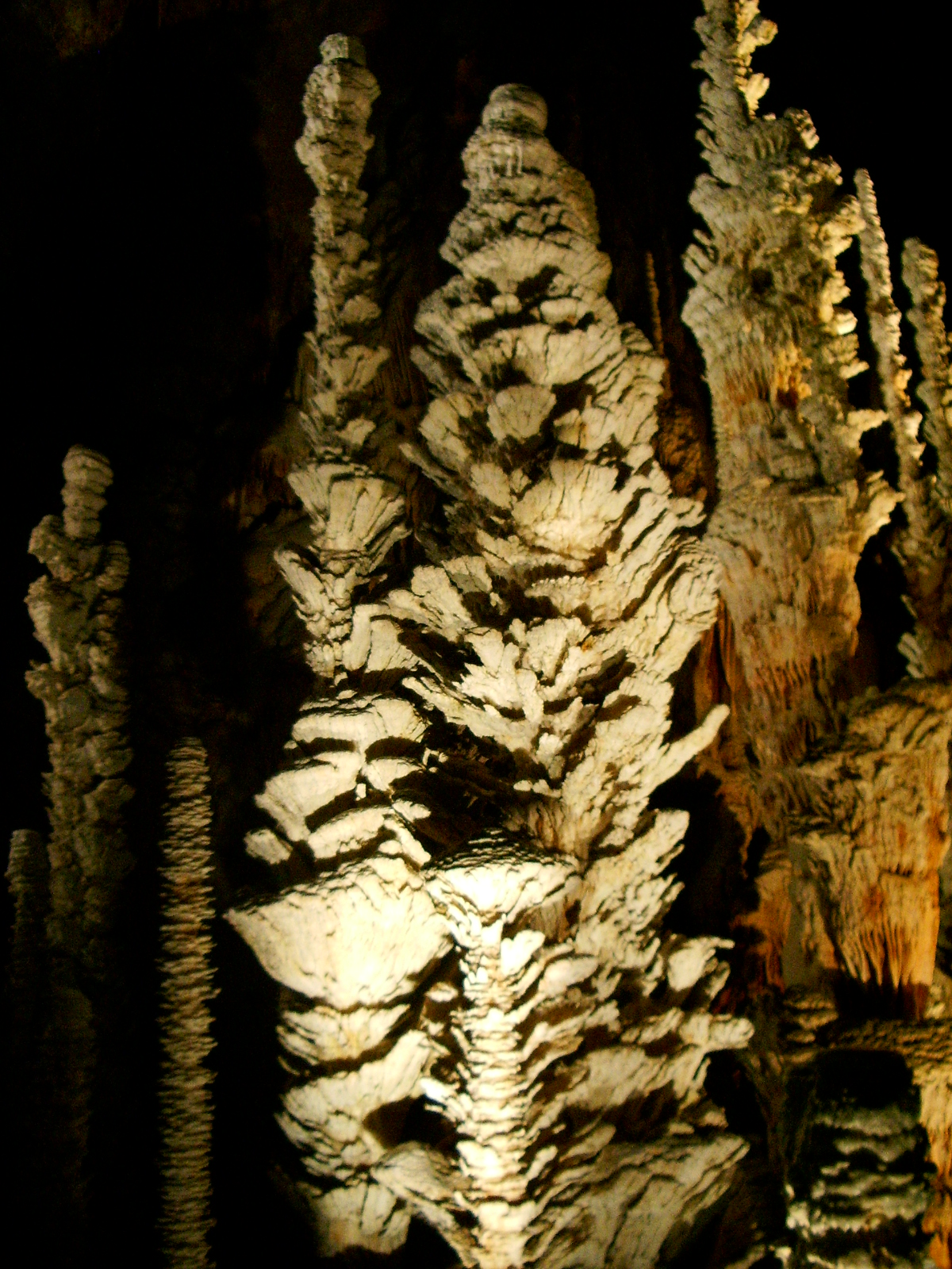 La chute rapide des gouttes d'eau forme des stalagmites en empilement d'assiettes, grotte de l'Aven Armand (Hures-la-Parade - Lozère)